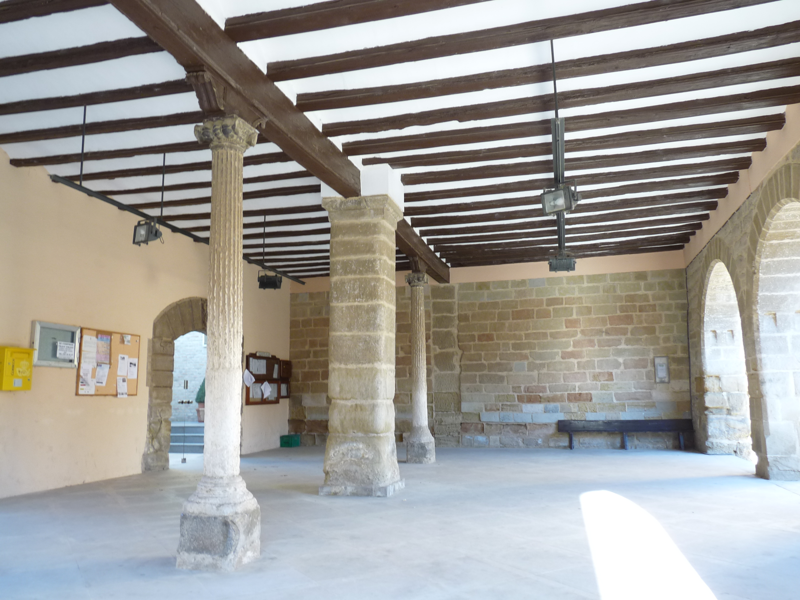 Sena - Ayuntamiento (1550-1575)